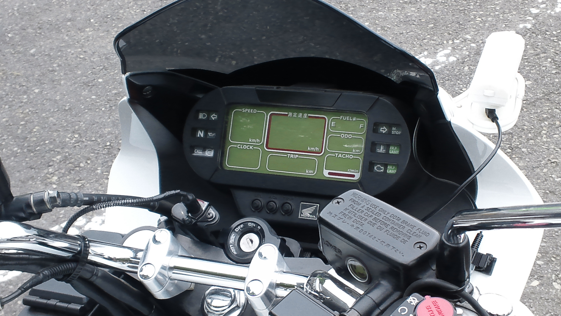 ホンダCB1300Pのインストゥルメンタルパネル（神奈川県警察厚木交通機動隊所属車）